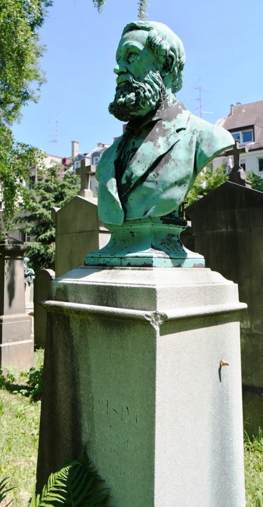 Grab des „Begründers der mathematischen Ästhetik“; Adolf Zeising (1810-1876), auf dem Alten Südlichen Friedhof in München